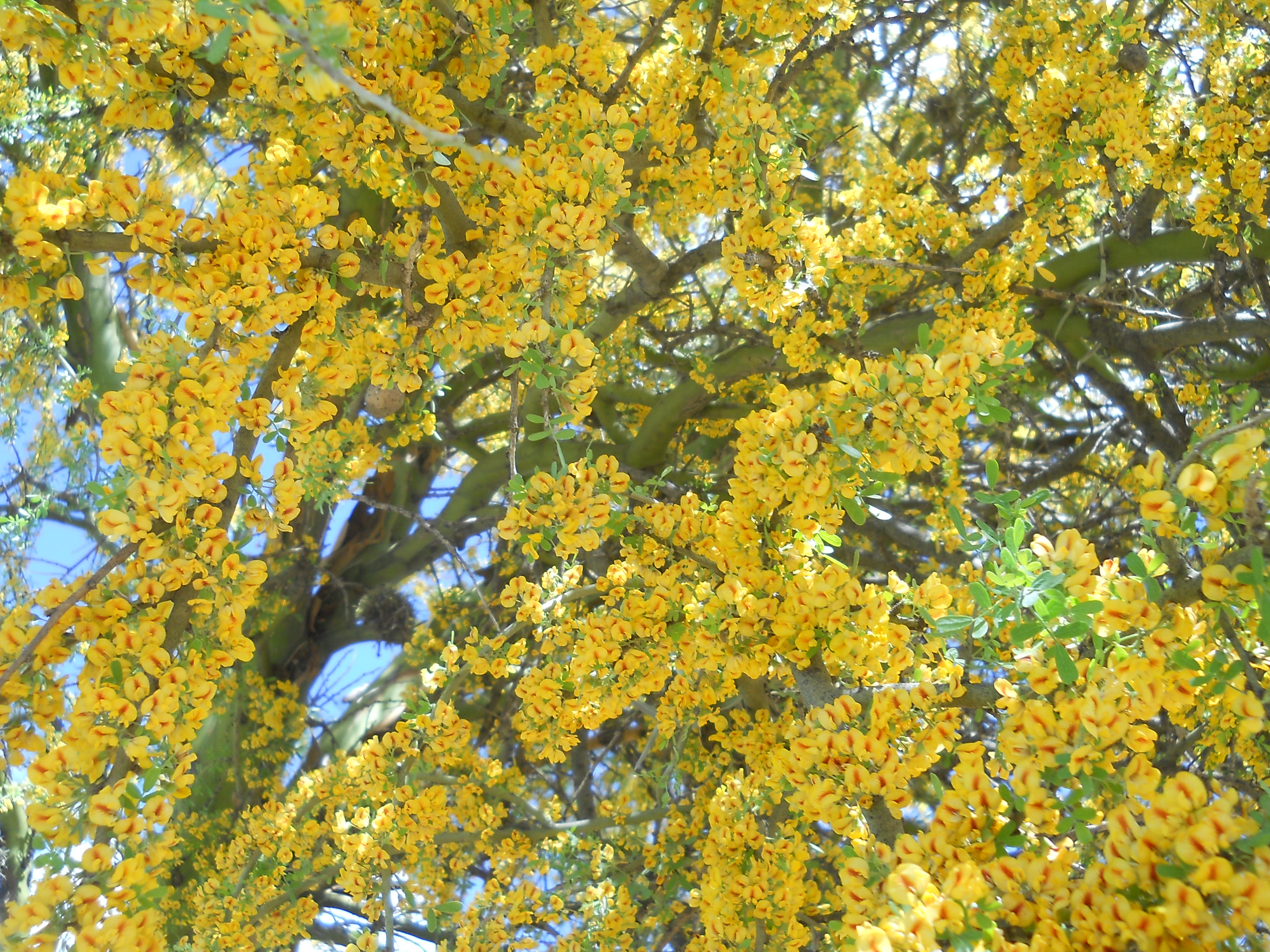 Detalle de flor. Ruta Nac. N° 38 entre la ciudad de Cruz del Eje y Villa de Soto